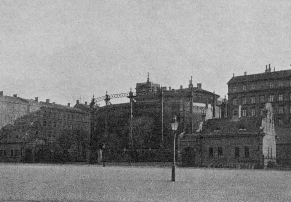 Klaragasverkets gasklocka vid Norra Bantorget i Stockholm, som 1910 byggdes om till Vinterpalatset. Ernst Jacobsson ritade 1876 de båda husen framför klockan